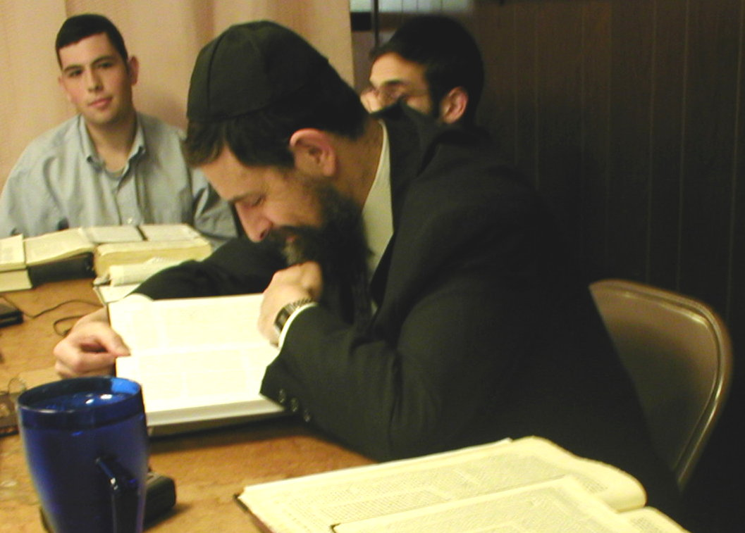 Rabbi Dovid Harris